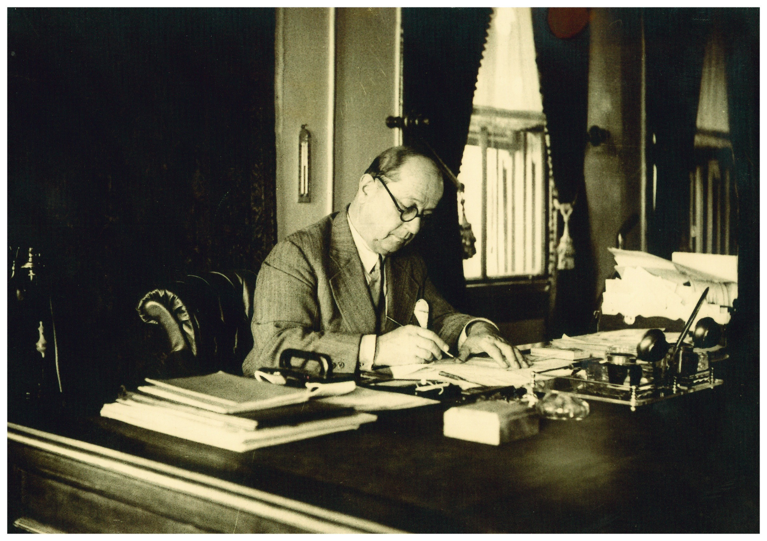 Milli Saraylar Müdürüyken makamındaki çalışma masasında